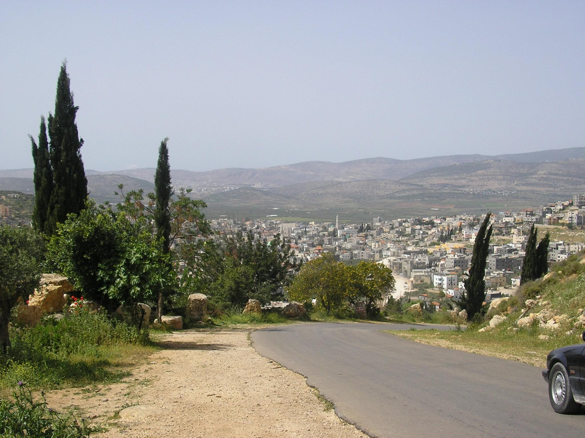 The northern entrance to the village of Arrabe in the Galilee in israel, from the Yodfat ridge. הכניסה הצפונית לכפר עראבה בגליל בישראל, מכיוון רכס יודפת